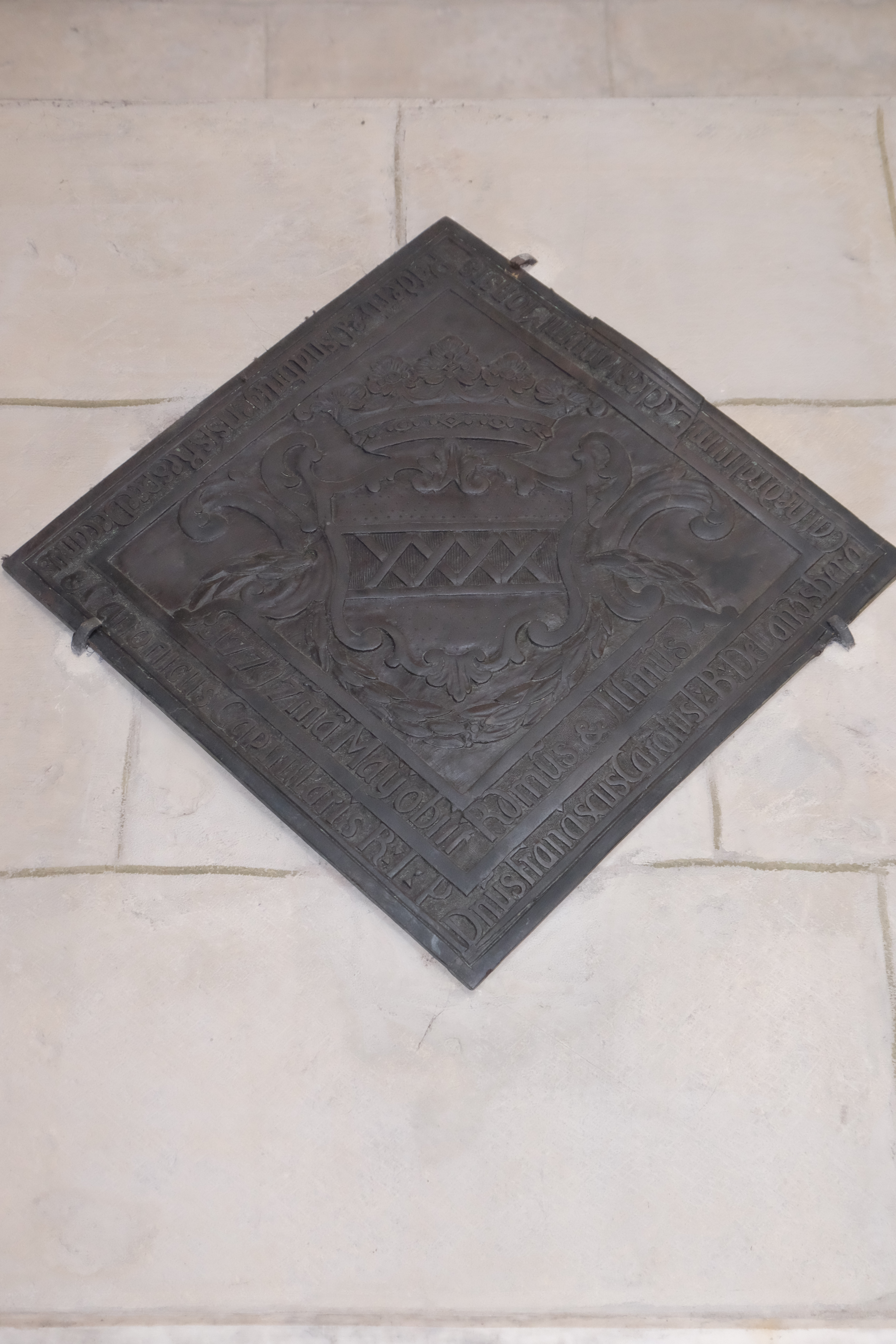 Wappen der Domherrn in Münster; Grabplatte des Domherren Franz Karl von Landsberg zu Erwitte